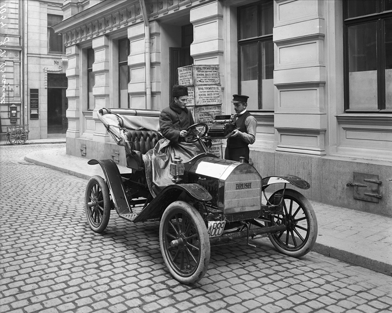 depicted place: Stockholm, Stockholm, Stockholm, Apelbergsgatan (Sverige (SE))